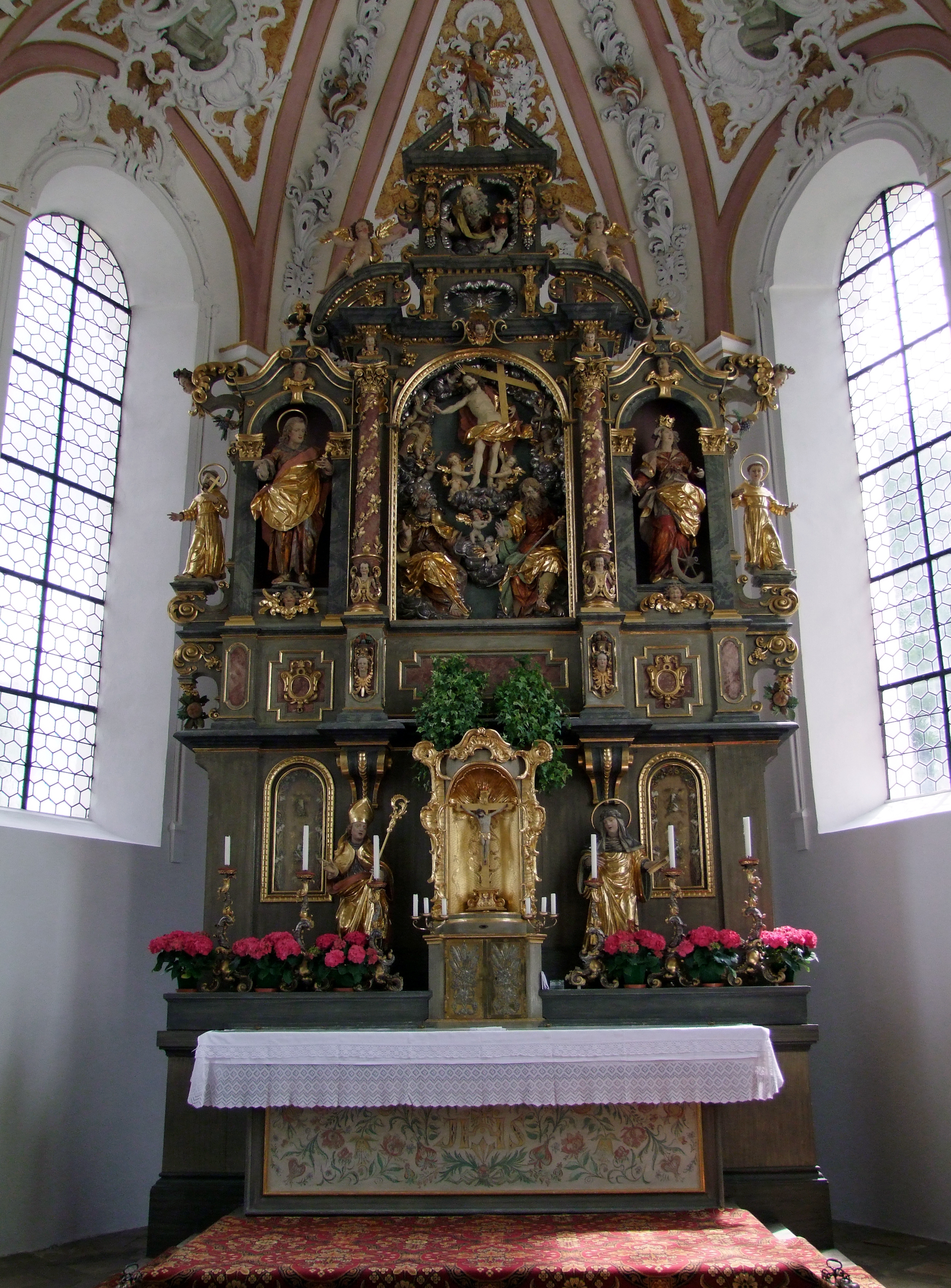 Hochaltar um 1630 erbaut. Ursprünglich in der evangelischen Dorfkirche in Erkheim bei Memmingen.